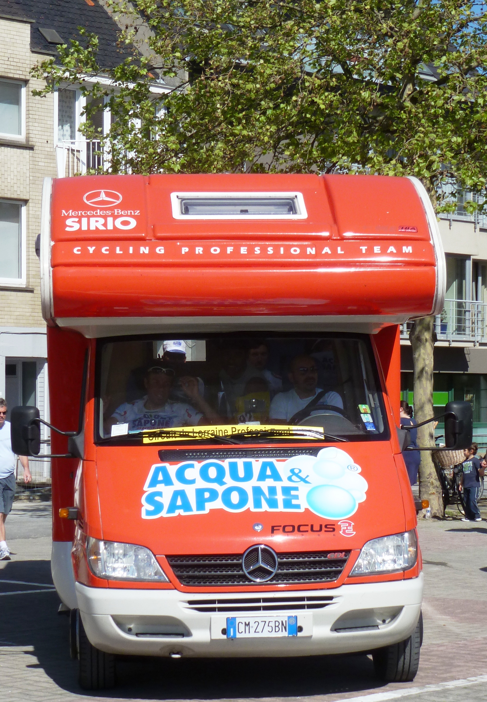 Auto des Radsportteams Acqua & Sapone 2012